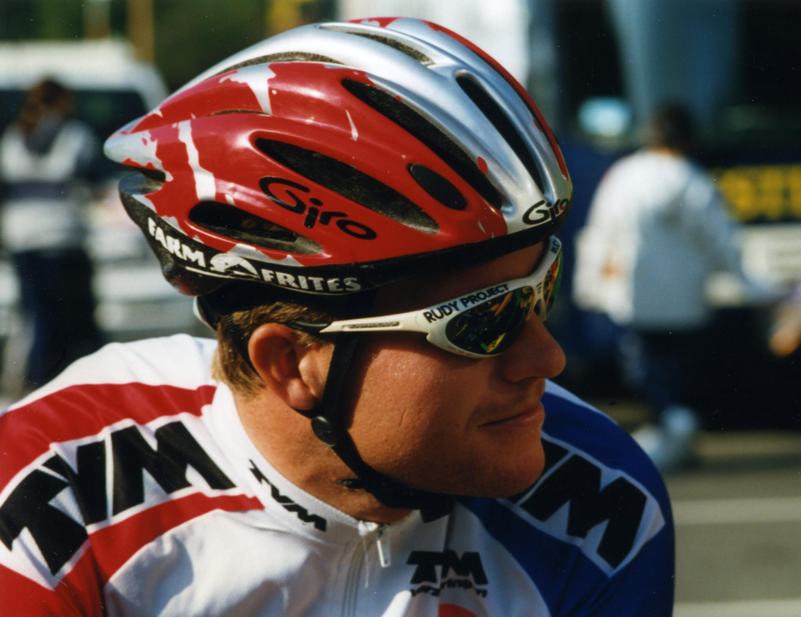 PARIS-TOURS 1997